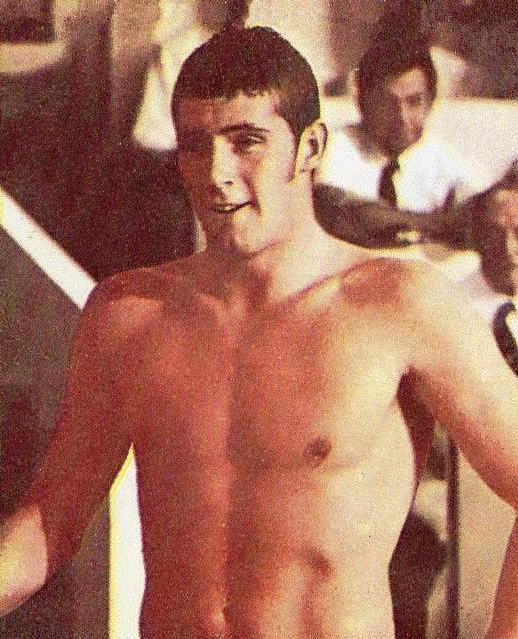 MUNCHEN/MONACO '72-PANINI-Figurina n.188- TERRELL - GBR -NUOTO-Rec